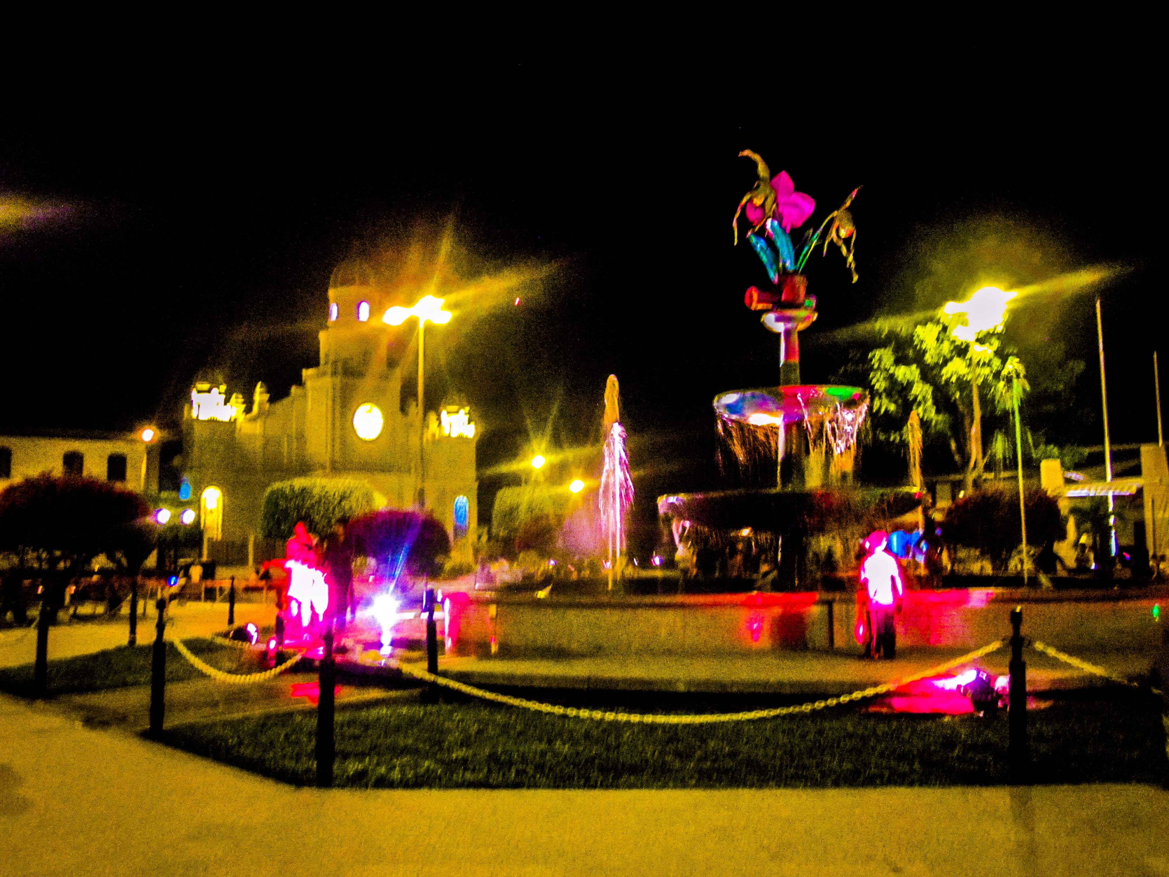 Foto de la plaza de Armas de Moyobamba de Noche